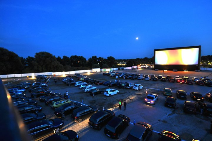 Autokino mit aufblasbarer Leinwand (AIRSCREEN) im Allerpark, Wolfsburg